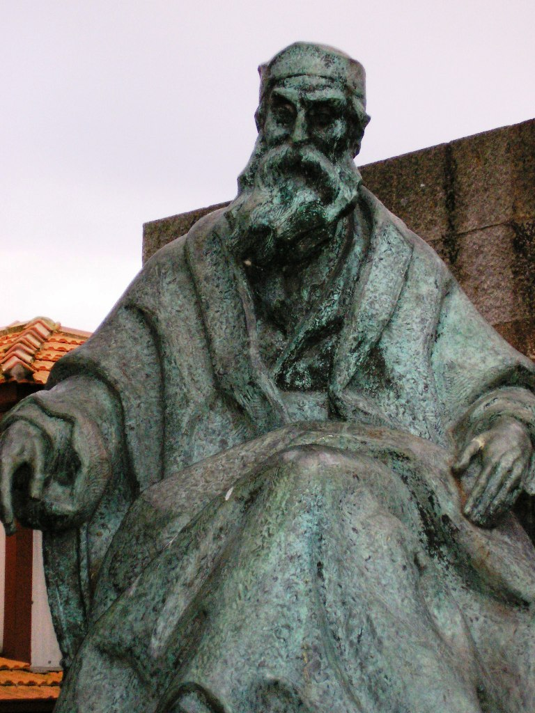 Depicted person: Guerra Junqueira